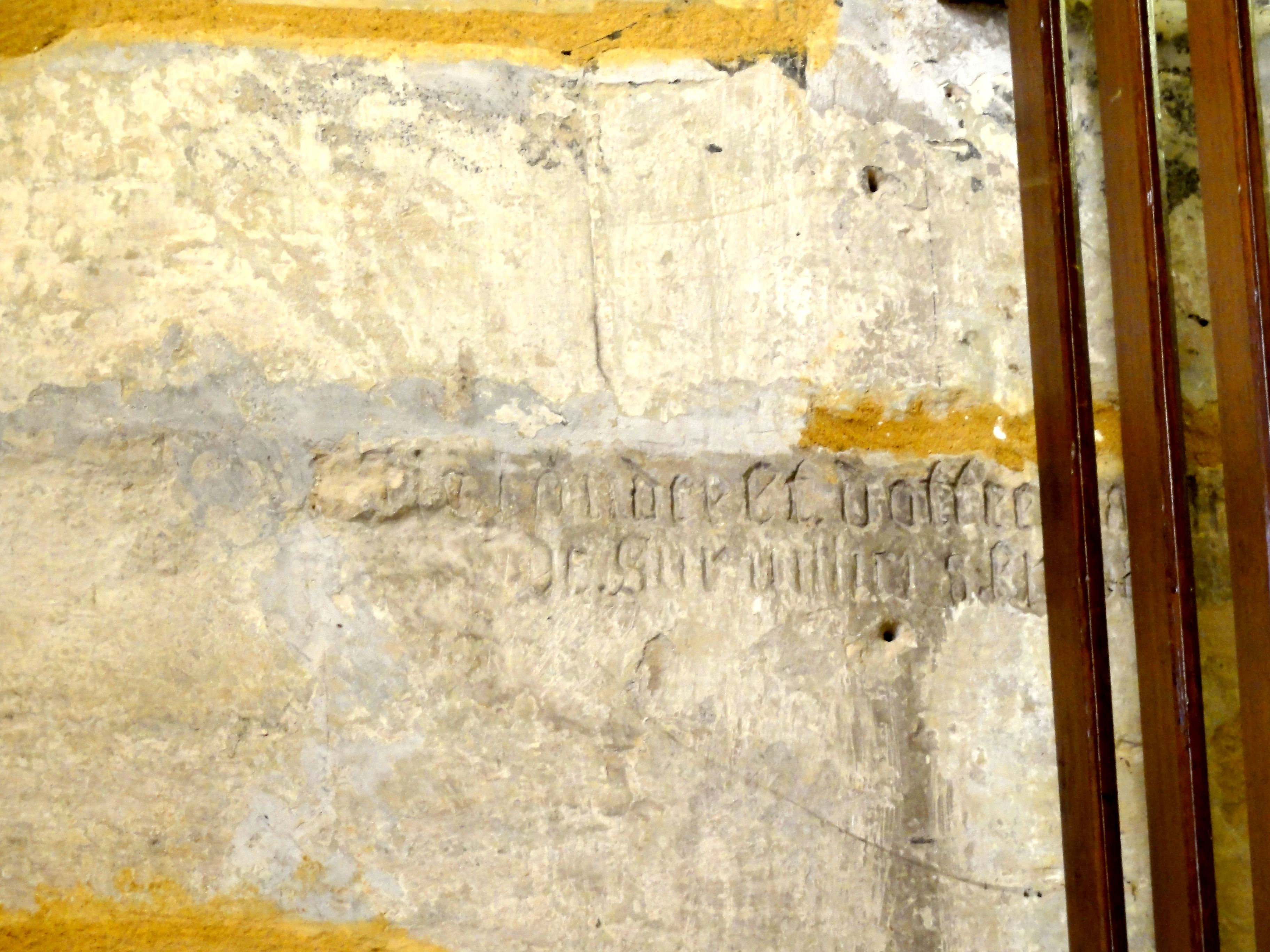 Bas-côté sud, inscription au revers de la façade (mur ouest du clocher) ; la partie droite n'est visible que depuis l'escalier de la tribune.